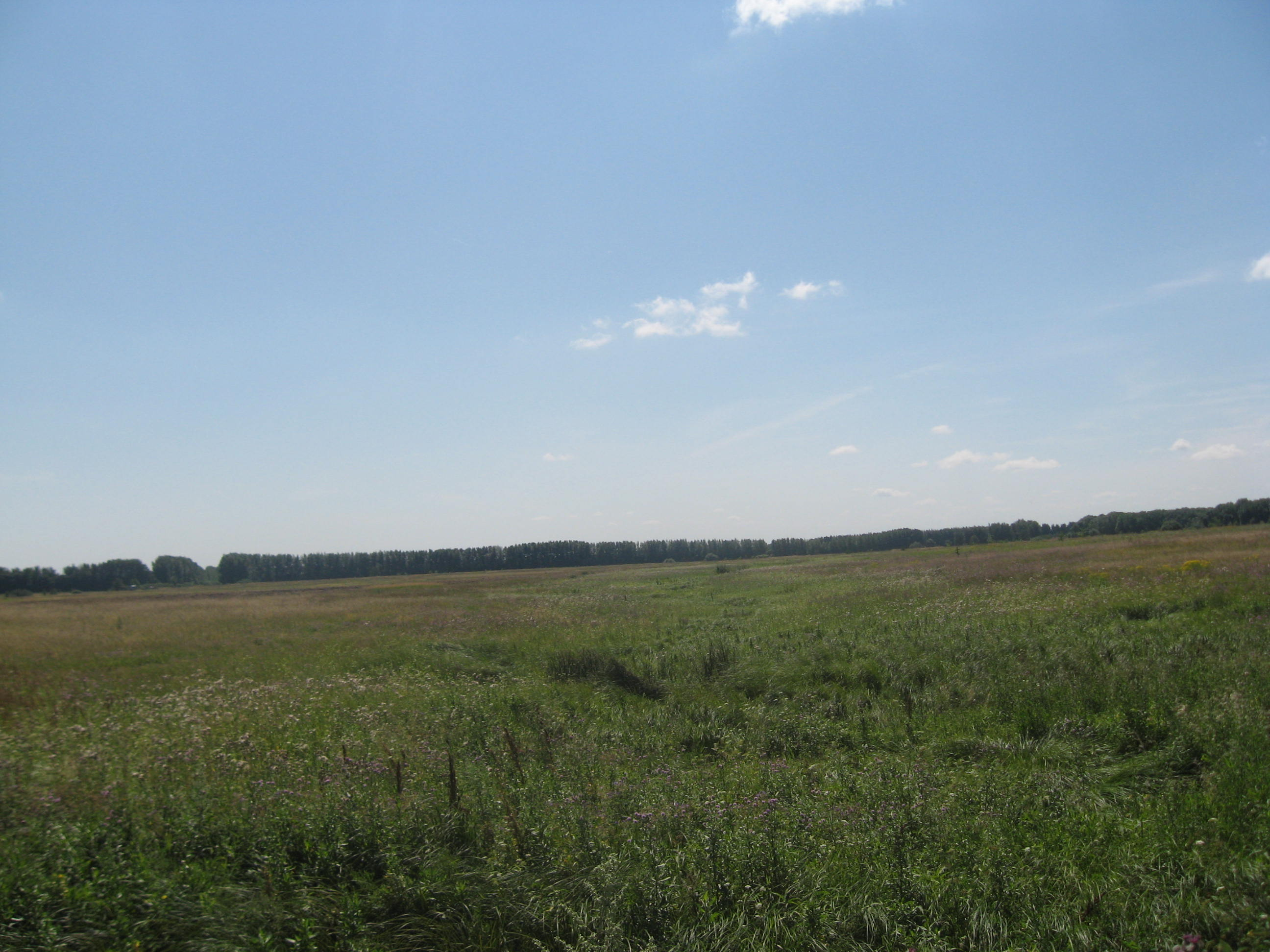 Видны луга.